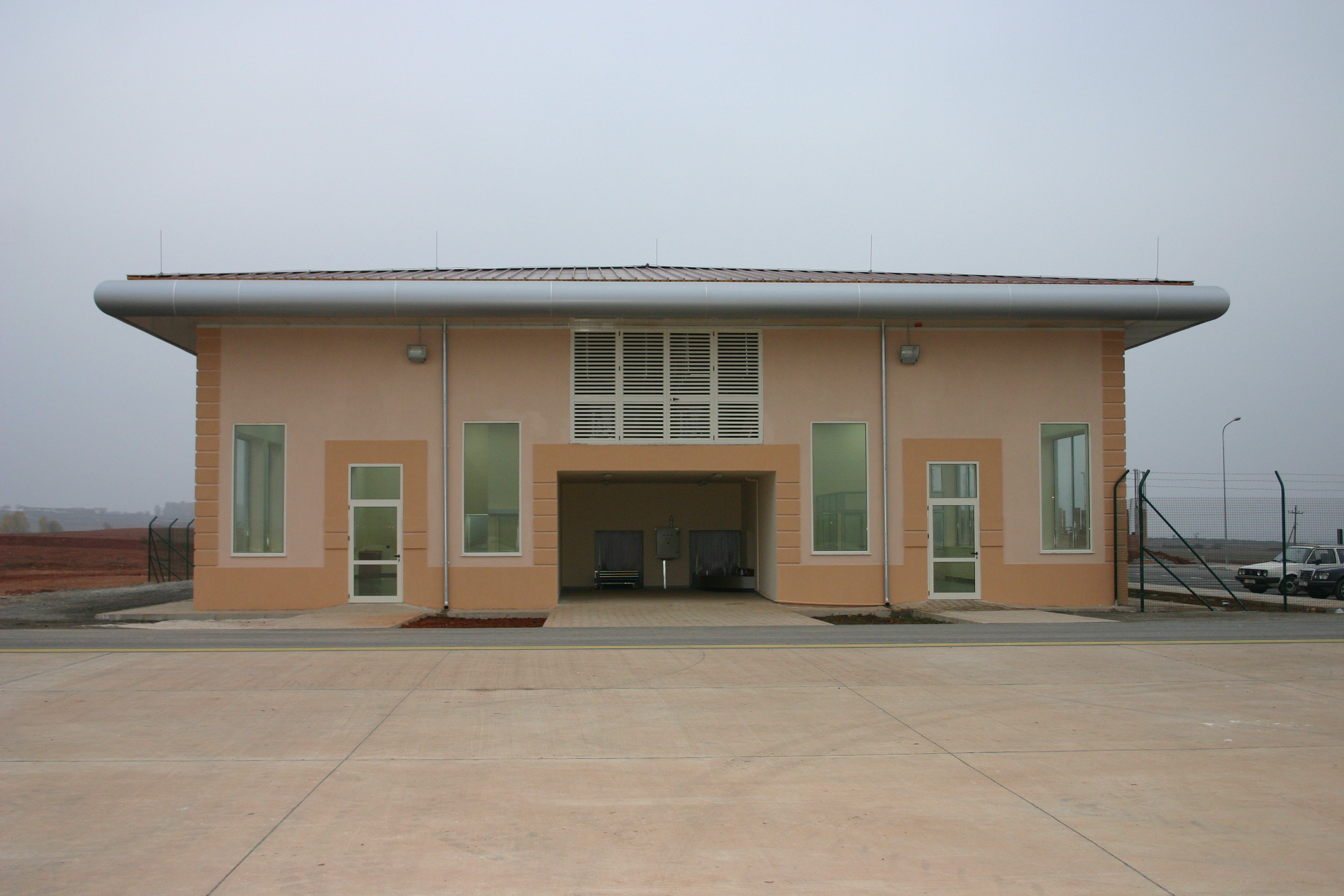 Aeroporti i Kukësit Zayed bin Sultan Al Nahyan eshte ndertuar pas krizes se Kosoves te vitit 1999 nga Emiratet e Bashkuara Arabe. Ky aeroport mban emrin e Zaid Bin Sulltan, Mbretit të Emirateve të Bashkuara Arabe, shtrihet në një sipërfaqe prej rreth 65 hektarë, 3 kilometra larg qytetit të Kukesit, dhe është i kategorisë ndërkombëtare C. Nuk eshte vene ne pune asnje dite.